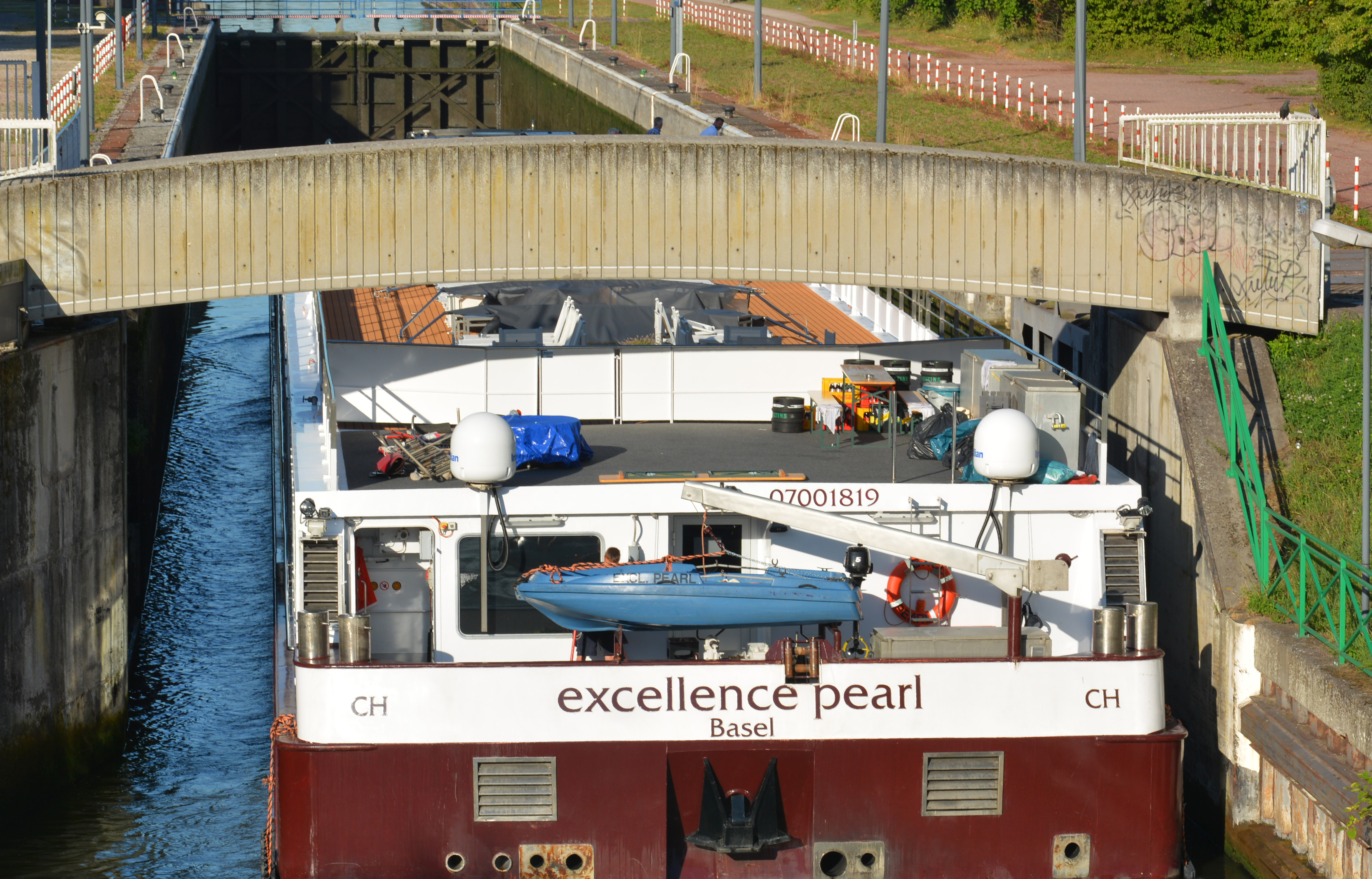 Péniche de tourisme (croisière sur canaux) venant de Belgique et se dirigeant vers le port de Lille. Elle entre ici dans le sas/bief de l'écluse du grand-Carré (située à la sortie de Lille, en Région Hauts-de-France)